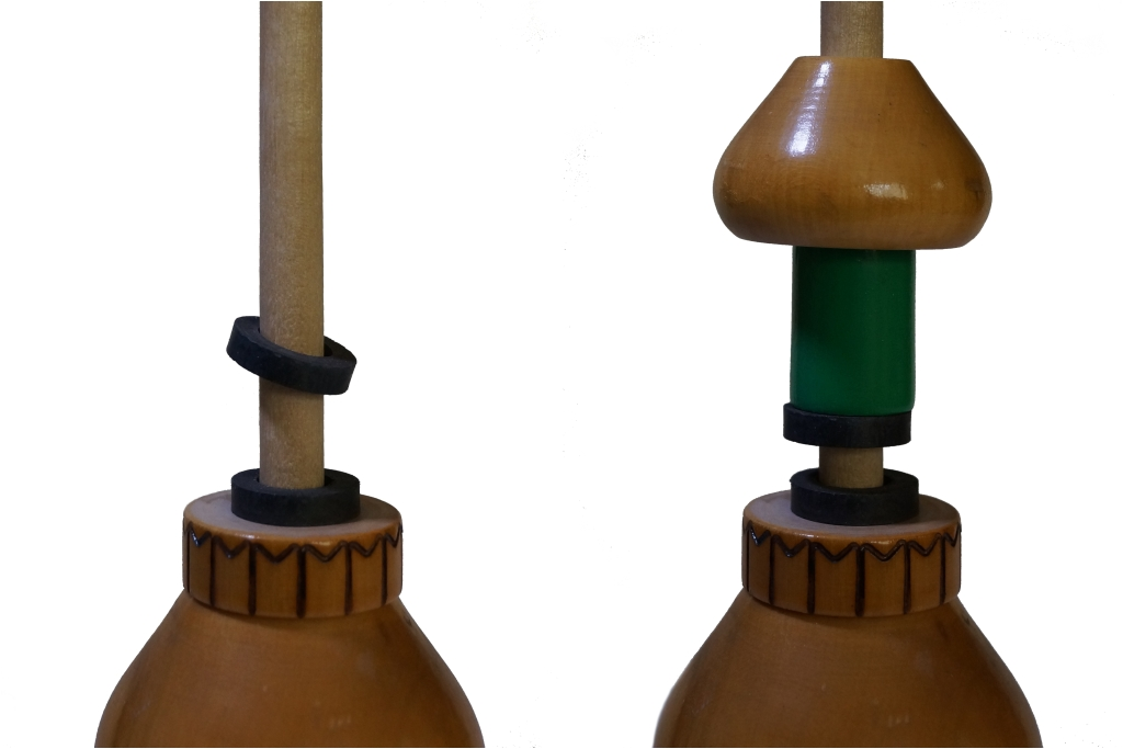 klkl